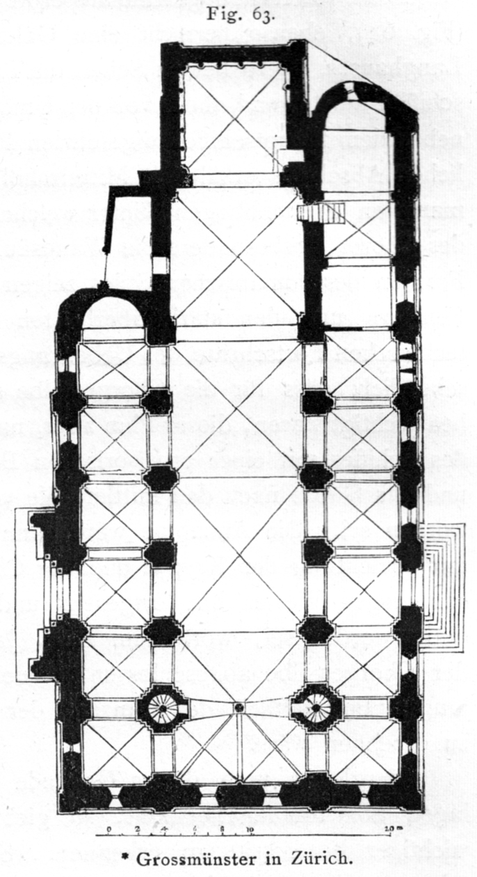 Grundriss des Grossmünsters in Zürich nach Rahn